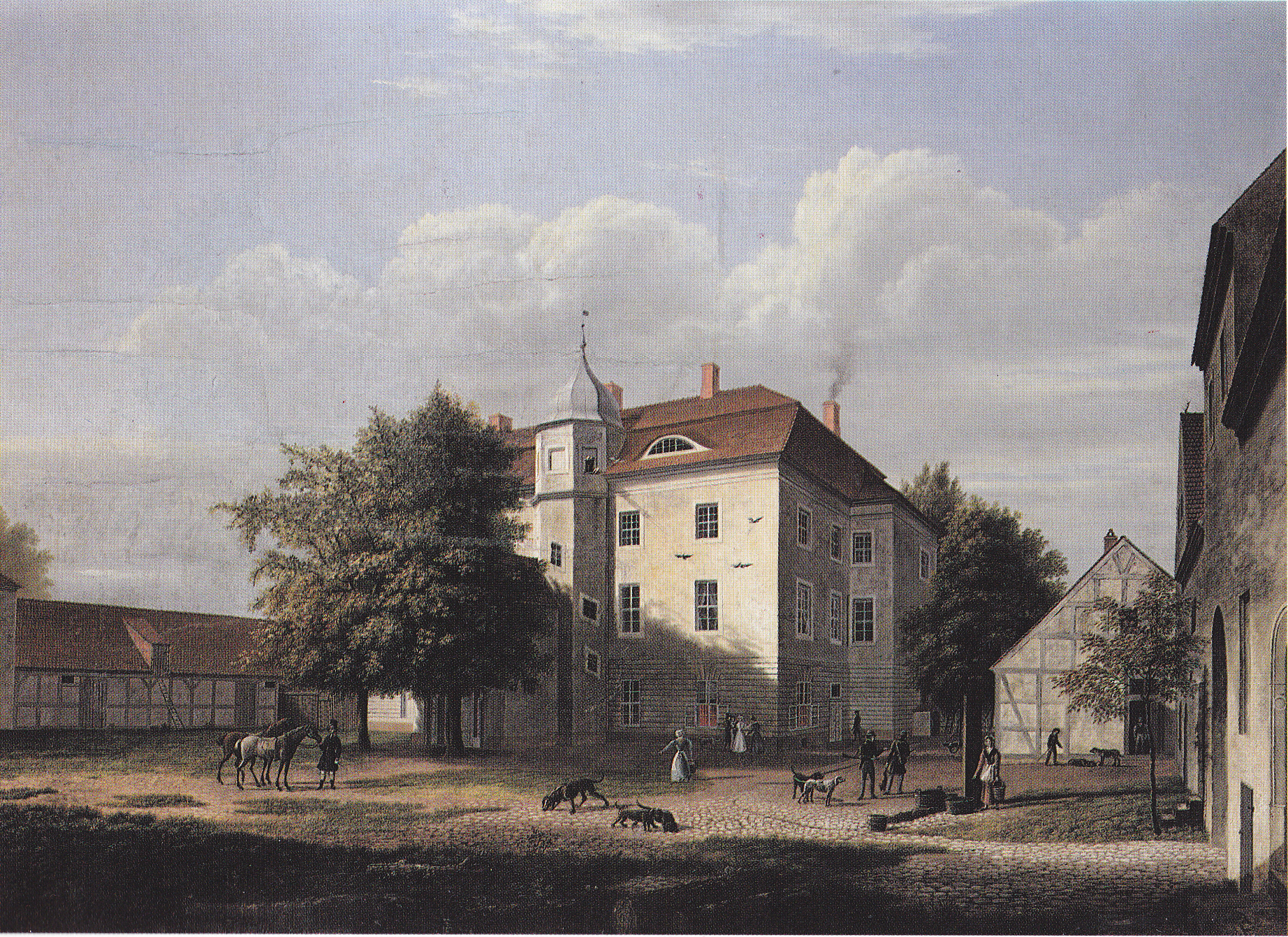 Der Hof des Jagdschlosses an einem Herbstnachmittag von Süden mit einem kleinen Früchte tragenden Vogelbeerbaum und Kastanien die anfangen sich zu verfärben. Der Standort des Malers war in der äußersten Südostecke. Die Tür an der Ostseite ist nicht mehr vorhanden, die Pumpe die damals im östlichen Teil stand steht jetzt im westlichen. Die Staffage zeigt passend zum Jagdschloss zwei von Reitknechten gehaltene Pferde von denen die Jäger abgestiegen sind, von denen einer einen Hasen schleppt. Das Format ist für die Zeit ungewöhnlich groß.